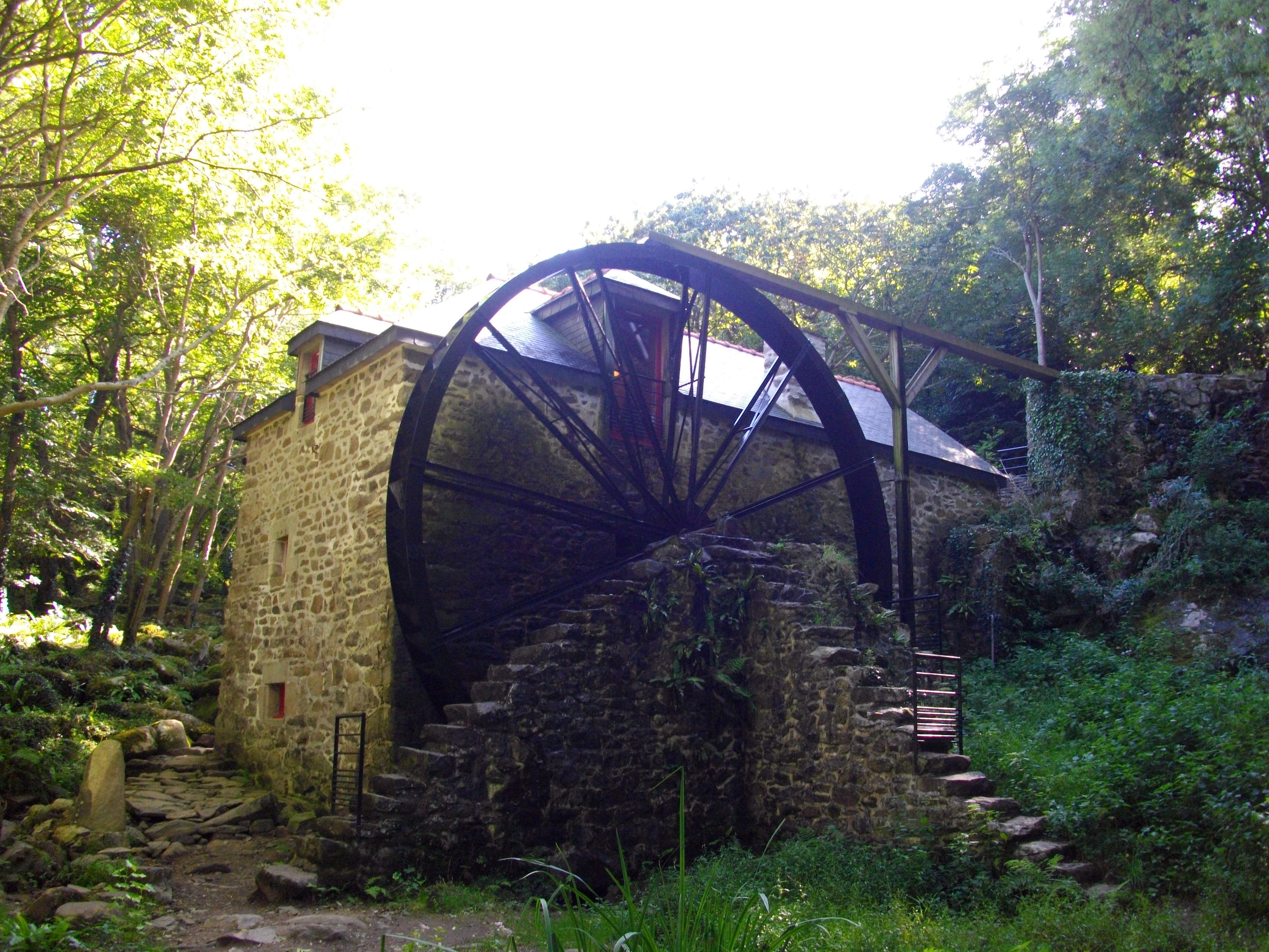 Moulin à eau de Keriolet (pointe du Millier) - Roue à augets